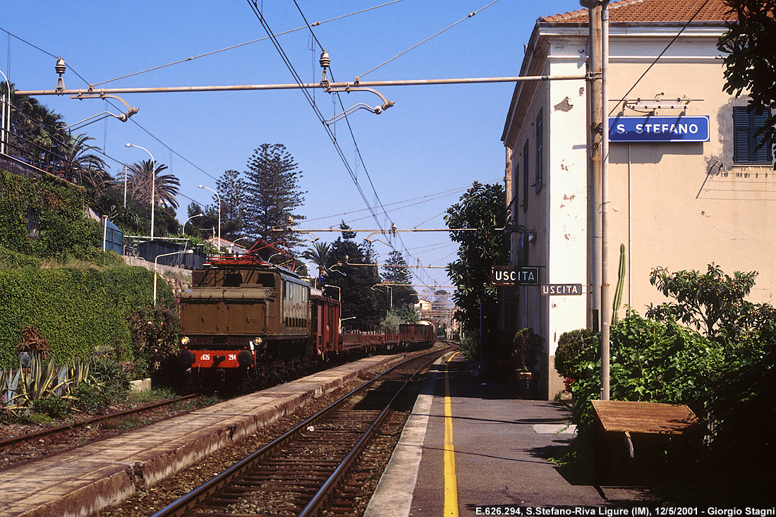 Il 12 maggio 2001, pochi mesi prima della chiusura della San Lorenzo-Ospedaletti – sostituita a settembre dall'attuale linea in galleria – venne organizzato un treno merci fotografico da Ventimiglia a Imperia, al traino della E.626.294 (OM-CGE, 1937). L'immagine ritrae il treno in sosta nella stazione di Santo Stefano-Riva Ligure.